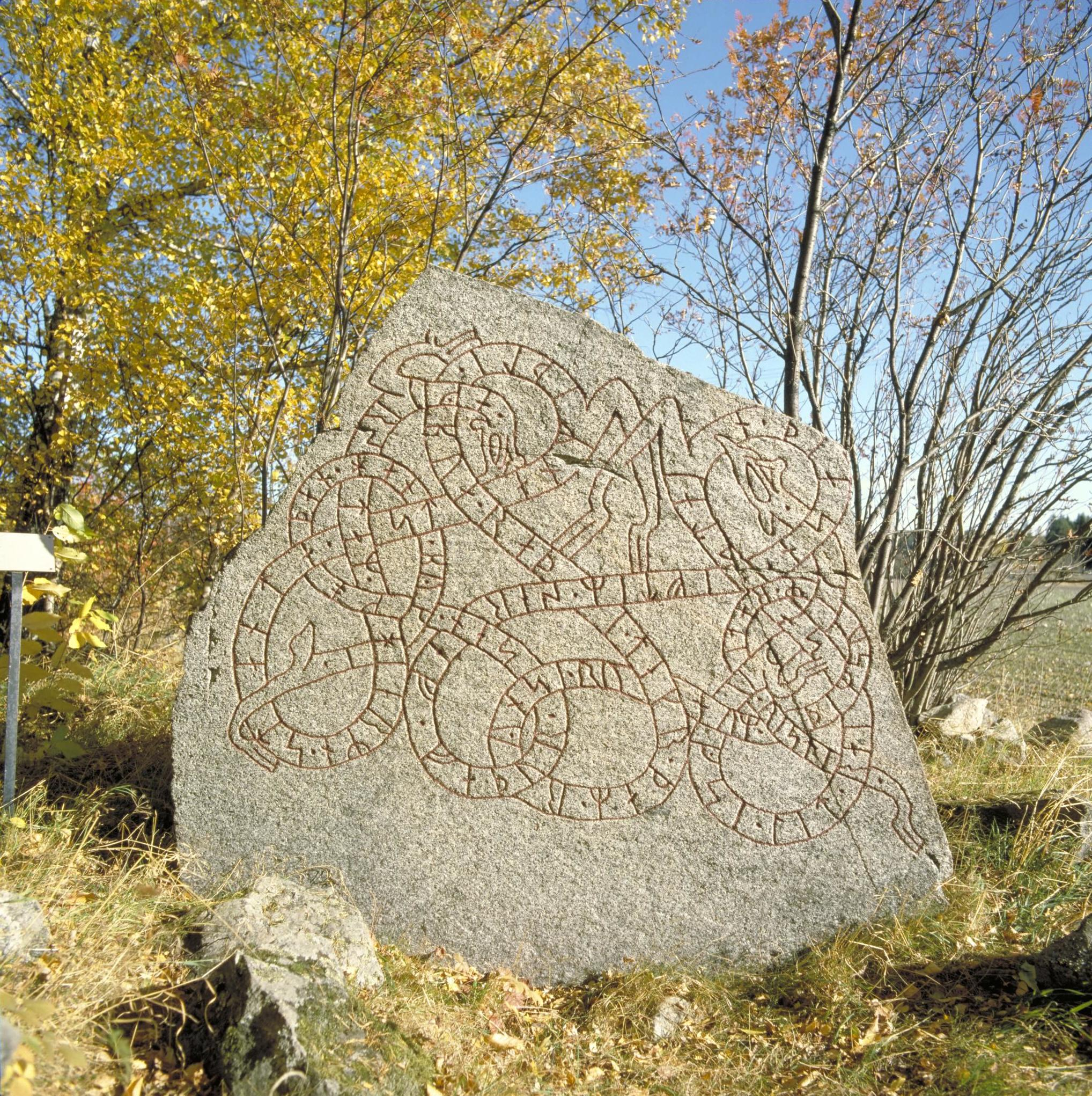 Inskriften lyder: Vidhugse lät resa denna sten efter Särev, sin gode fader. Han bodde i Ågersta. Här skall stenen stå mellan byarna. Råde den man som runvis är, de runorna som Balle ristat.